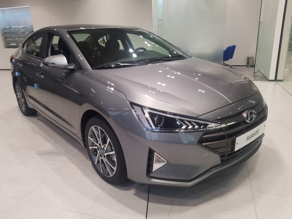 현대 더 뉴 아반떼 정측면